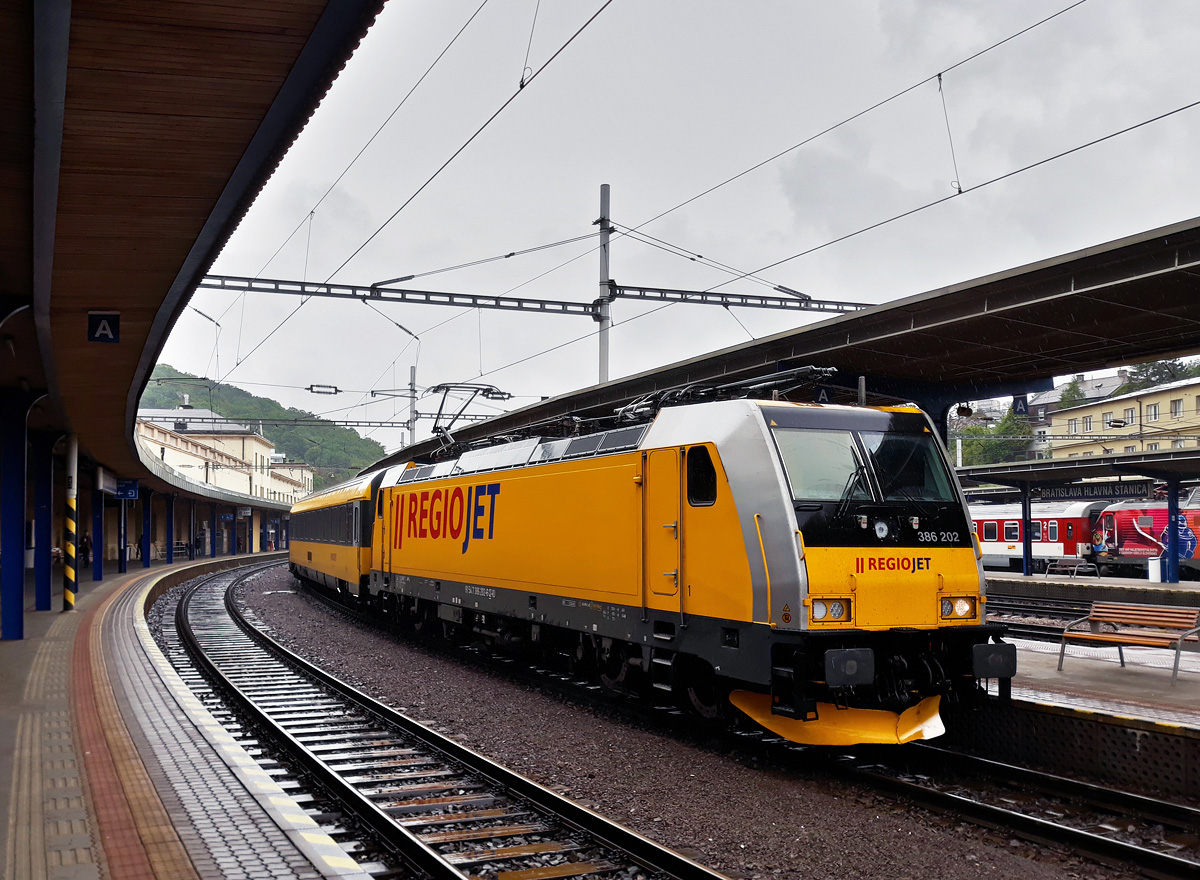 Lokomotiva Bombardier TRAXX F140 MS2E společnosti Regiojet v Bratislavě hl.st.